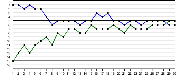 Graphe représentant l'évolution au classement du FC Grenoble rugby lors de la saison 2009-2010 de Pro D2.